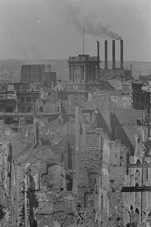 Original image description from the Deutsche Fotothek Blick auf das Westkraftwerk von der Kreuzkirche aus